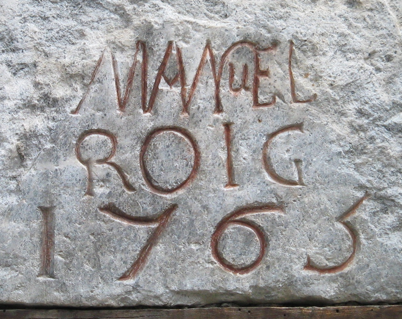 Dintell d'una casa de la Vall d'Aran amb el nom del mestre de cases (Manuel Roig) i la data de construcció (1765))